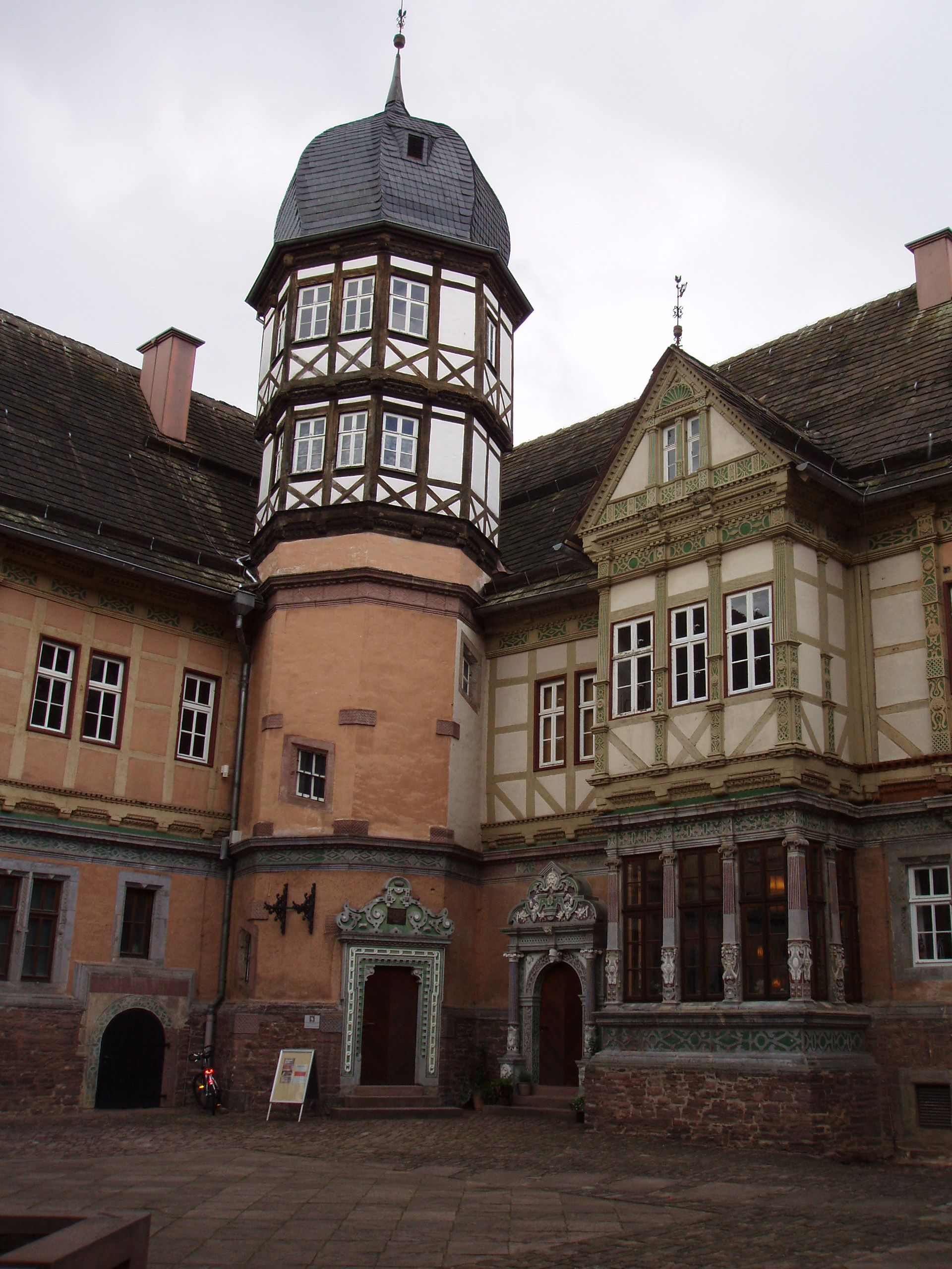 Schloss Bevern, Innenhof.jpg